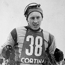 Eugenio Monti in Cortina d'Ampezzo, Italy in 1950s